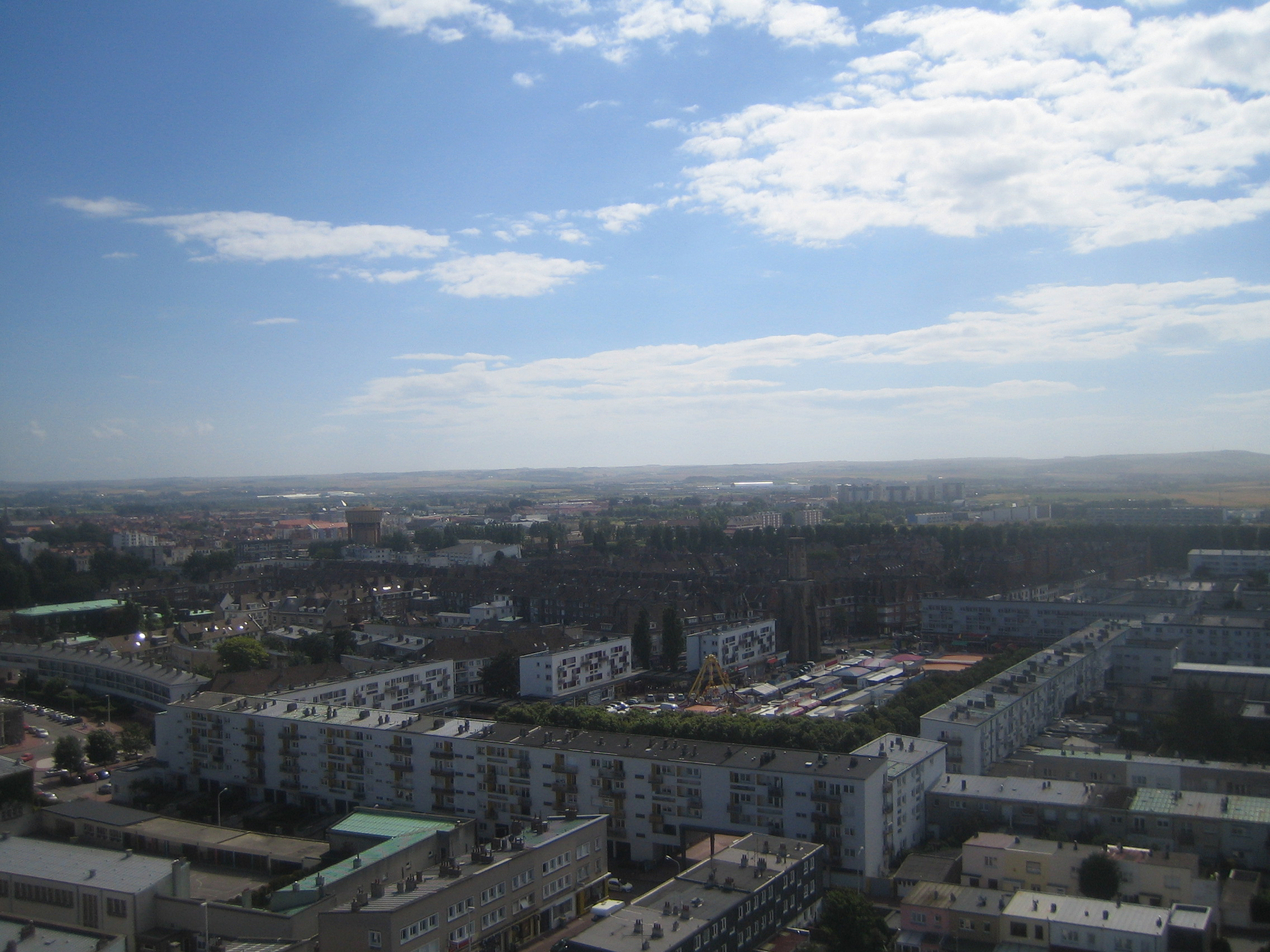 Calais.